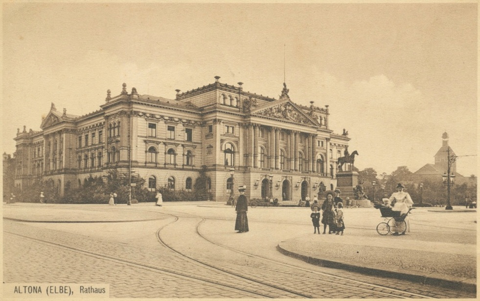 Altona (Elbe) Rathaus